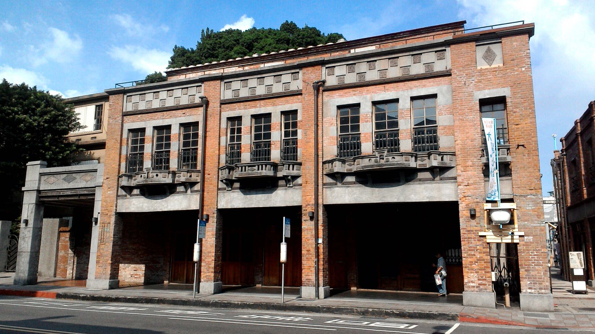 永興亭,台北市萬華區龍山次分區福音里